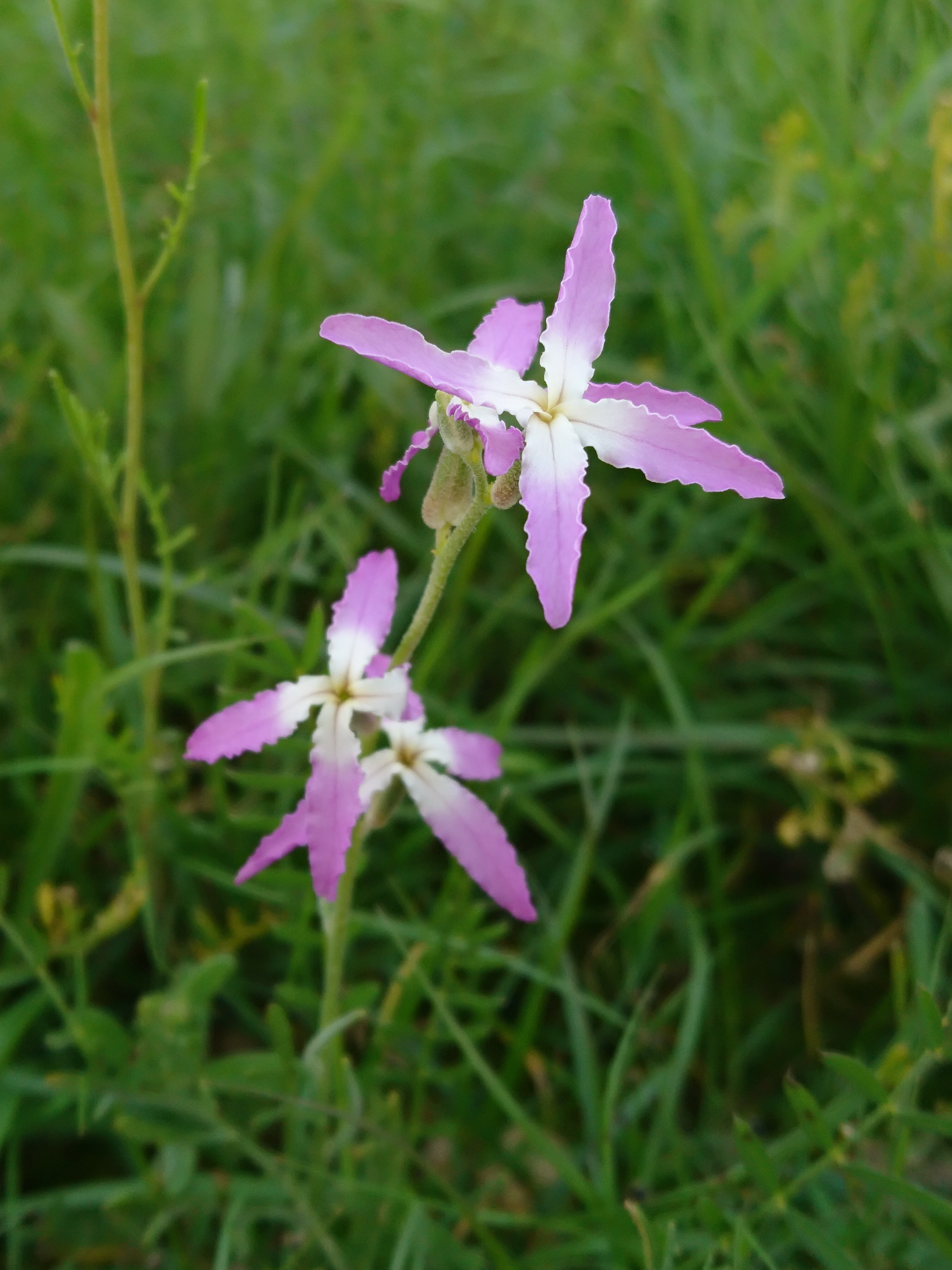 شب‌بوی خودرو بهبهان